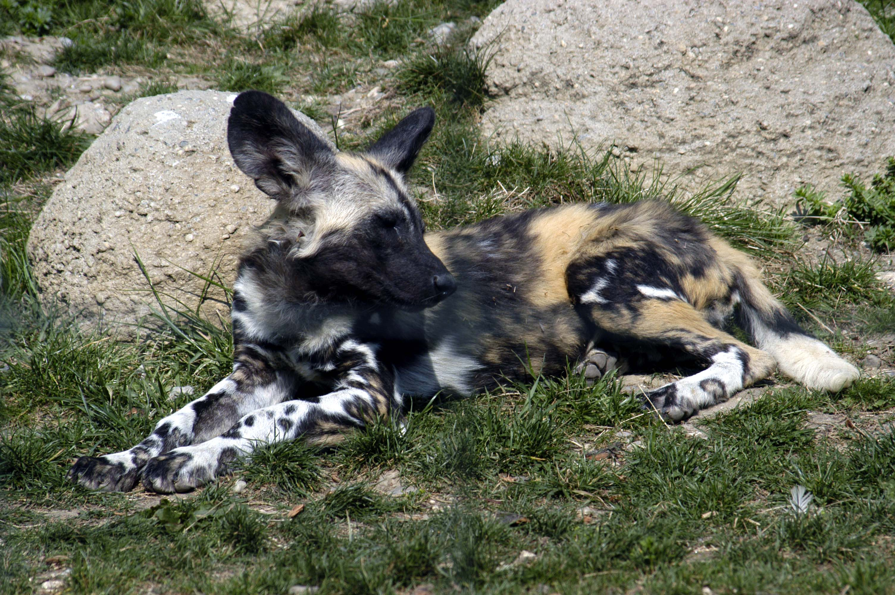 zwierzę z ogrodu zoologicznego w bazylei